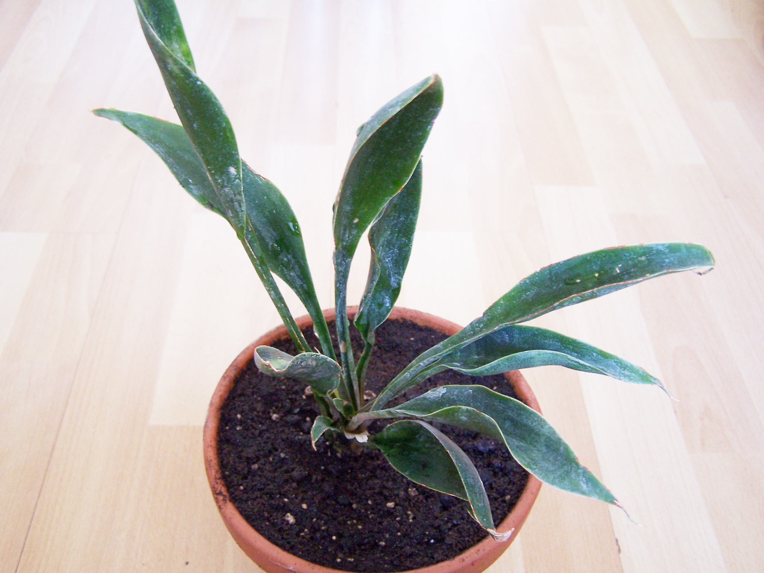 Sansevieria concinna (Habitus)